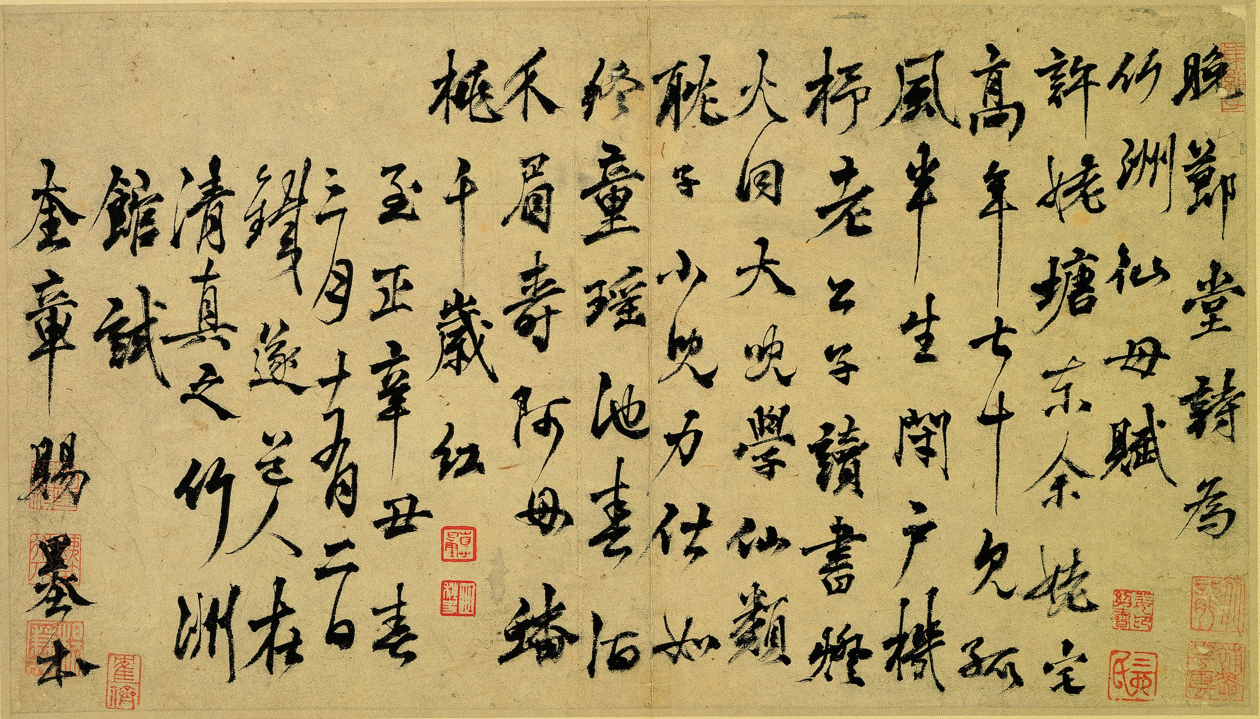 楊維楨（1279-1368）書晚節堂詩